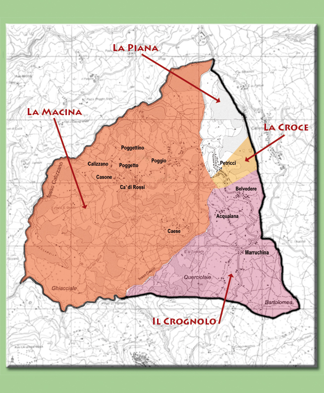 Confini delle quattro borgate in cui è suddiviso il territorio di Petricci